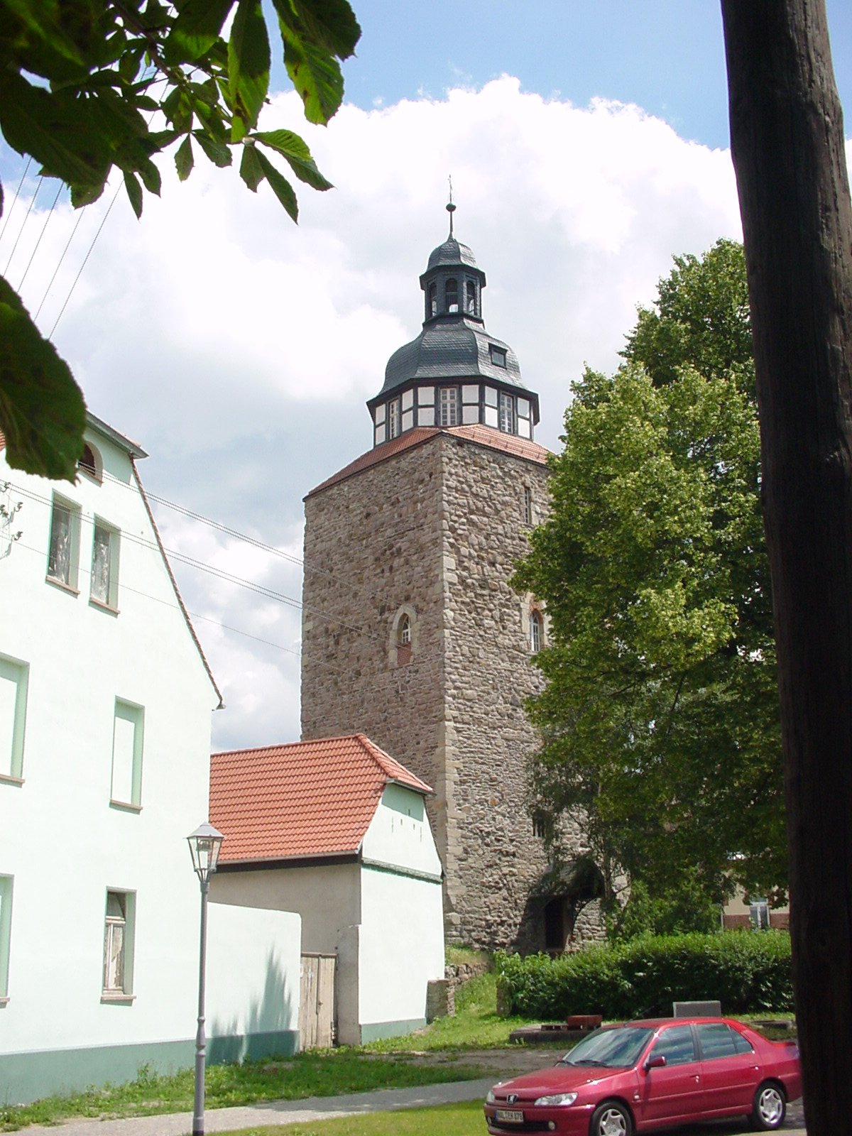 eigenes Foto, Schlossturm Gröbzig public domain